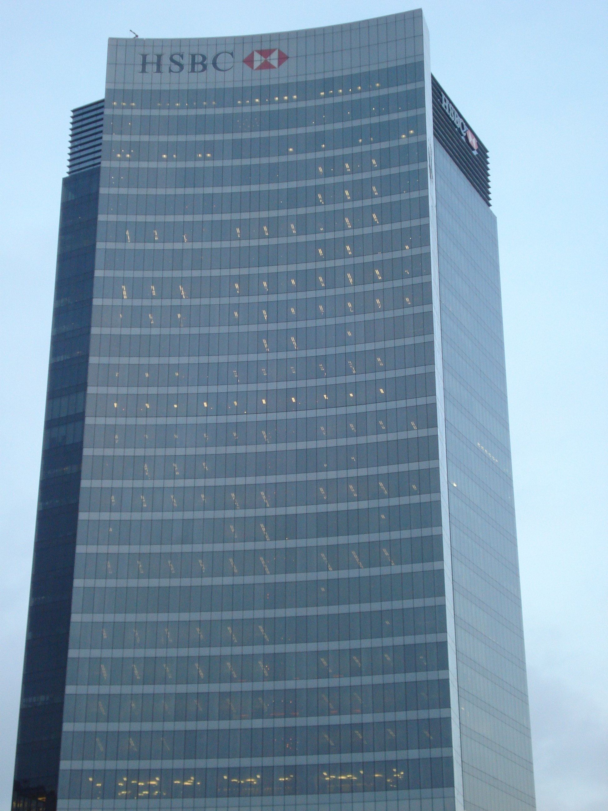 Torre HSBC, la cual se ubica en Paseo de la Reforma, en ciudad de México.